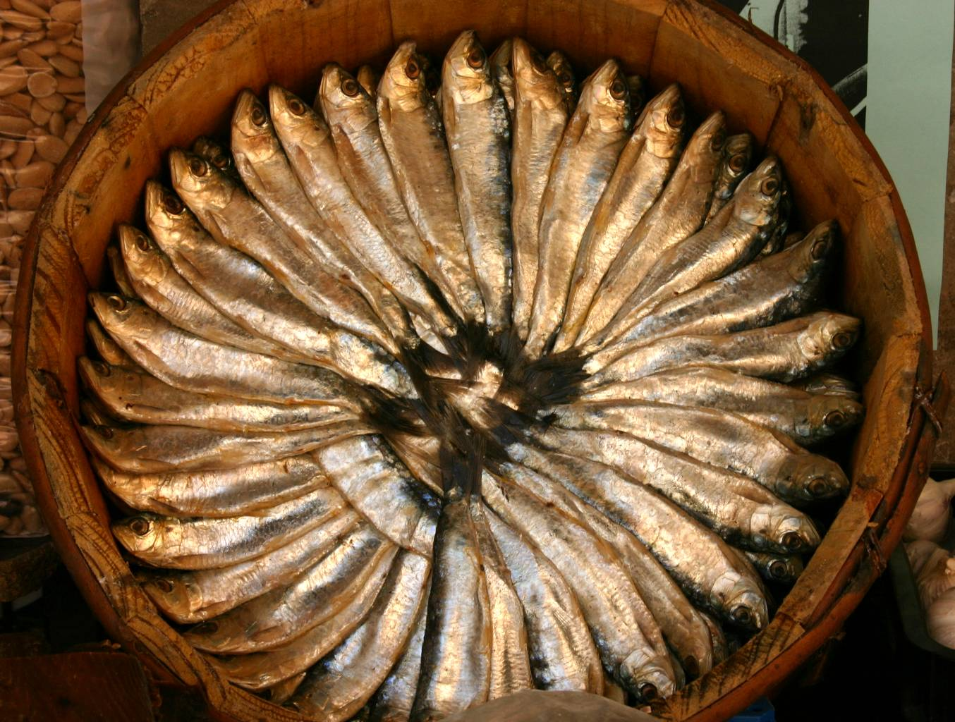 Cuba de sardinas en Granada, España. (2009)